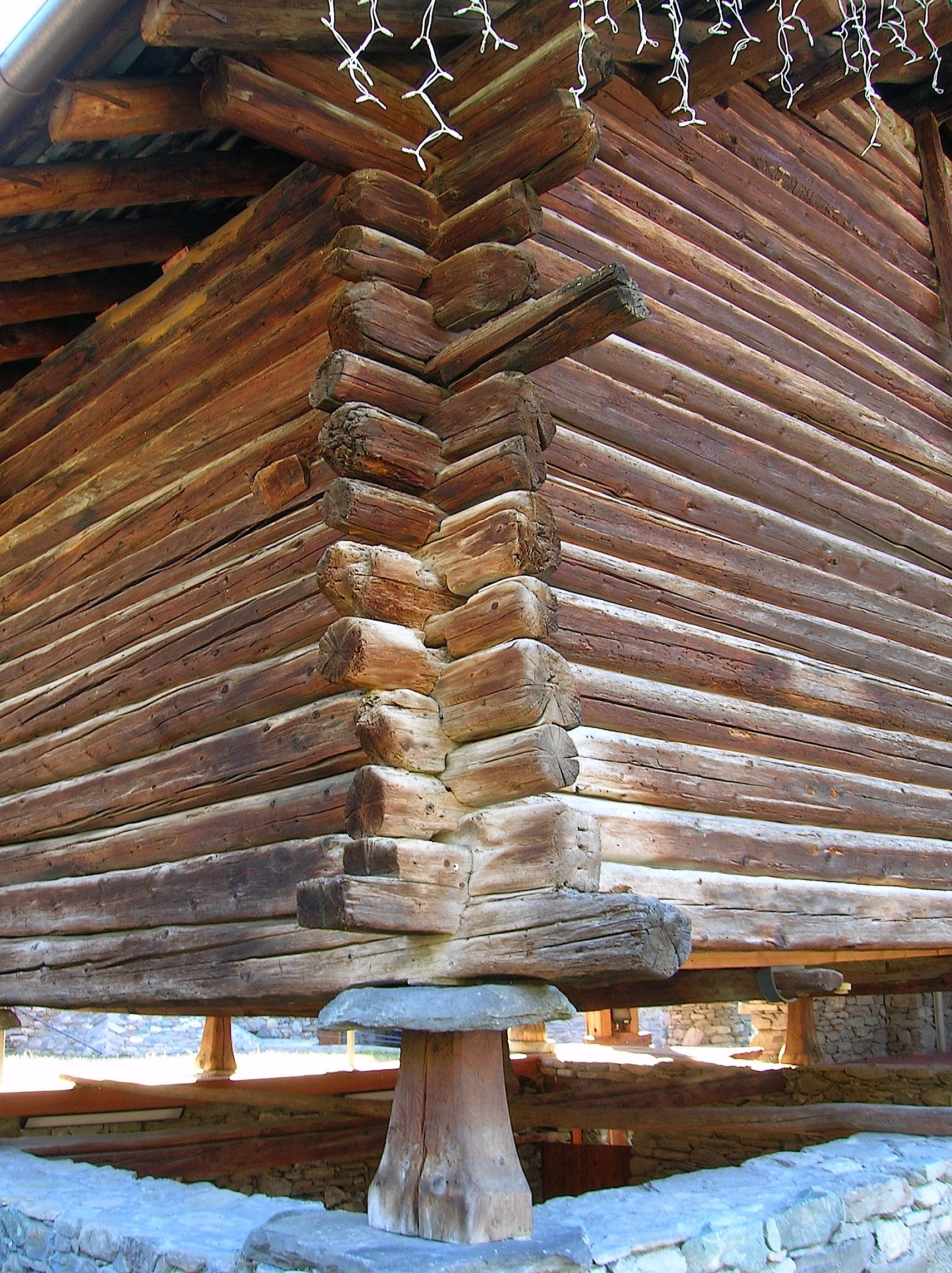 Casa Montel/Rascard di Moline, Località Moline, Gressan, Valle d'Aosta, Italia. This is a photo of a monument which is part of cultural heritage of Italy.